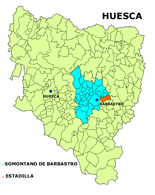 Mapa del municipio de Estadilla Creado el 05.10.2006 por Dionisio en base a Image:Aragon municipalities.png